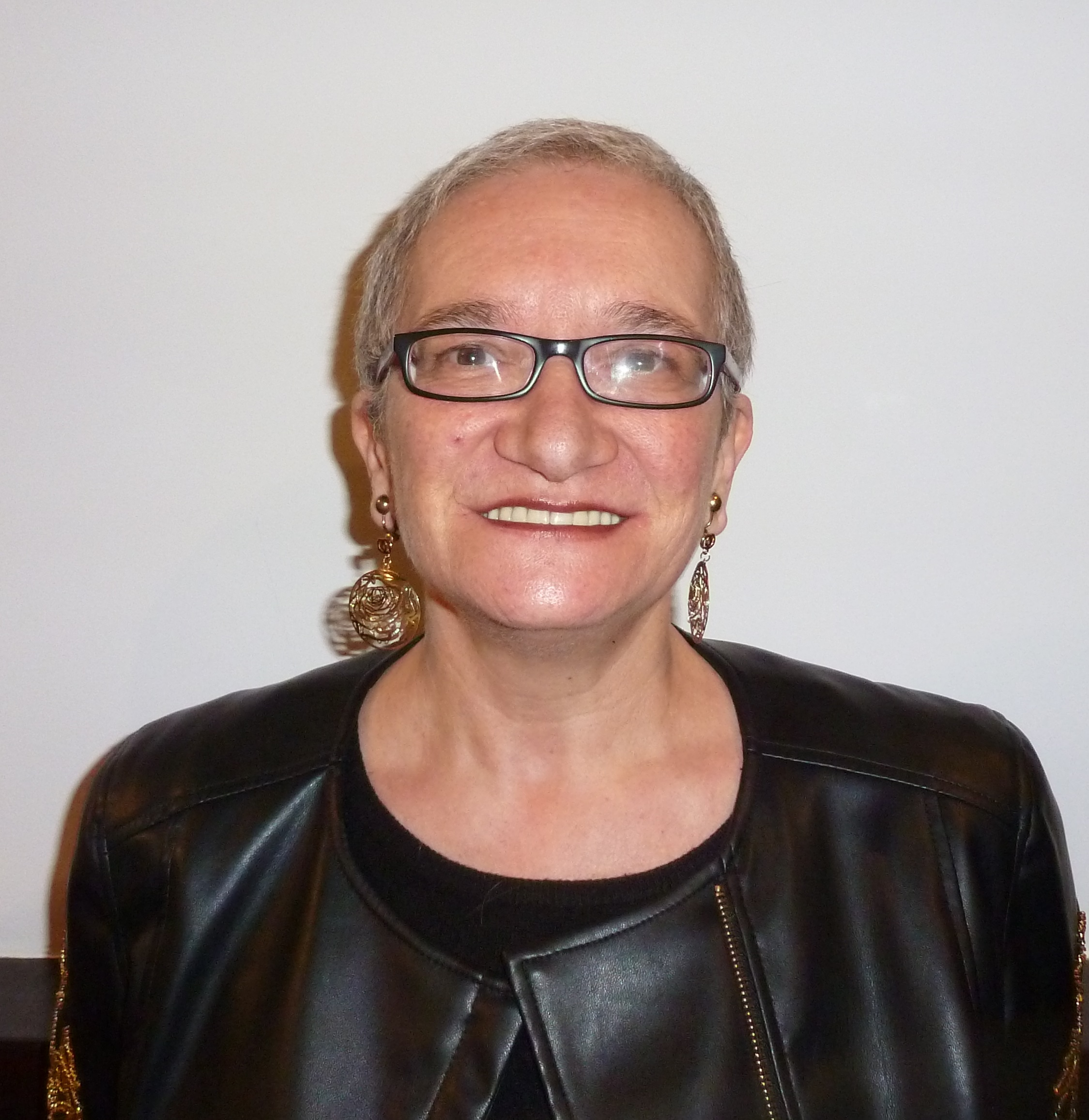 Isabel Blanco, avogada e escritora galega, na Casa das Campás de Pontevedra